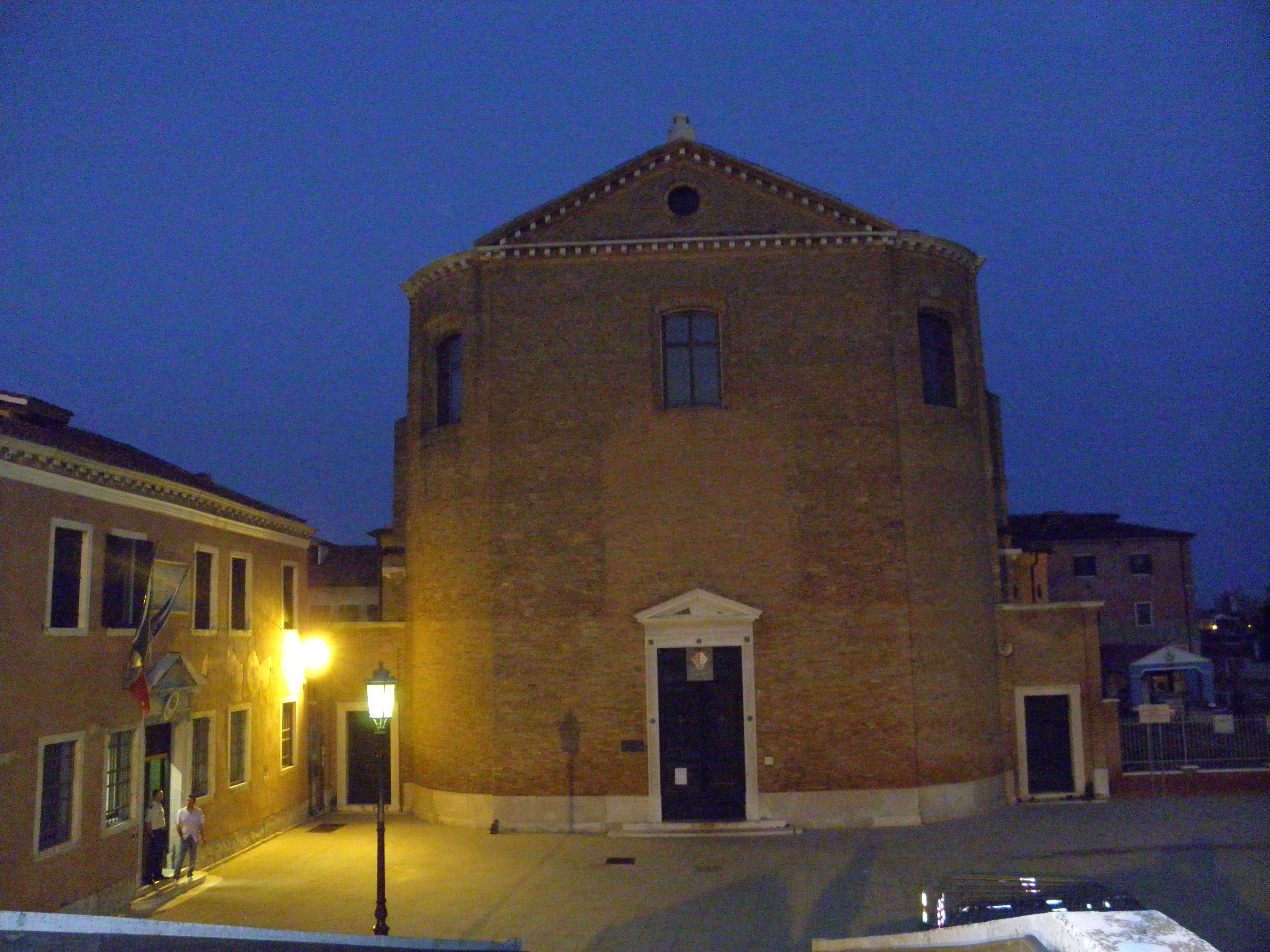 Chioggia: vista notturna della facciata della chiesa parrocchiale di San Domenico.